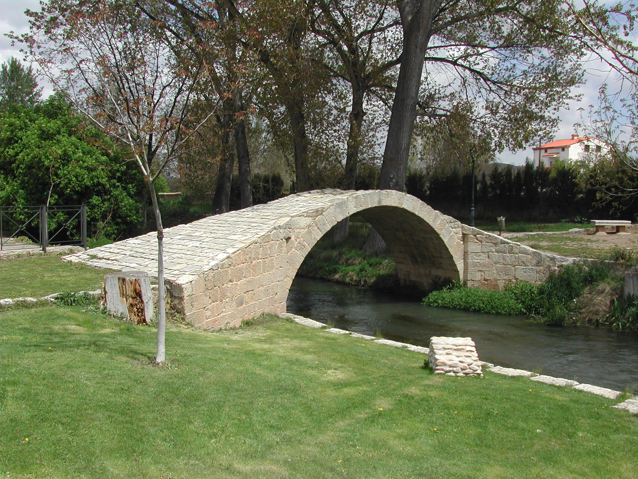 Fotografía del puente de Calamocha (Teruel)